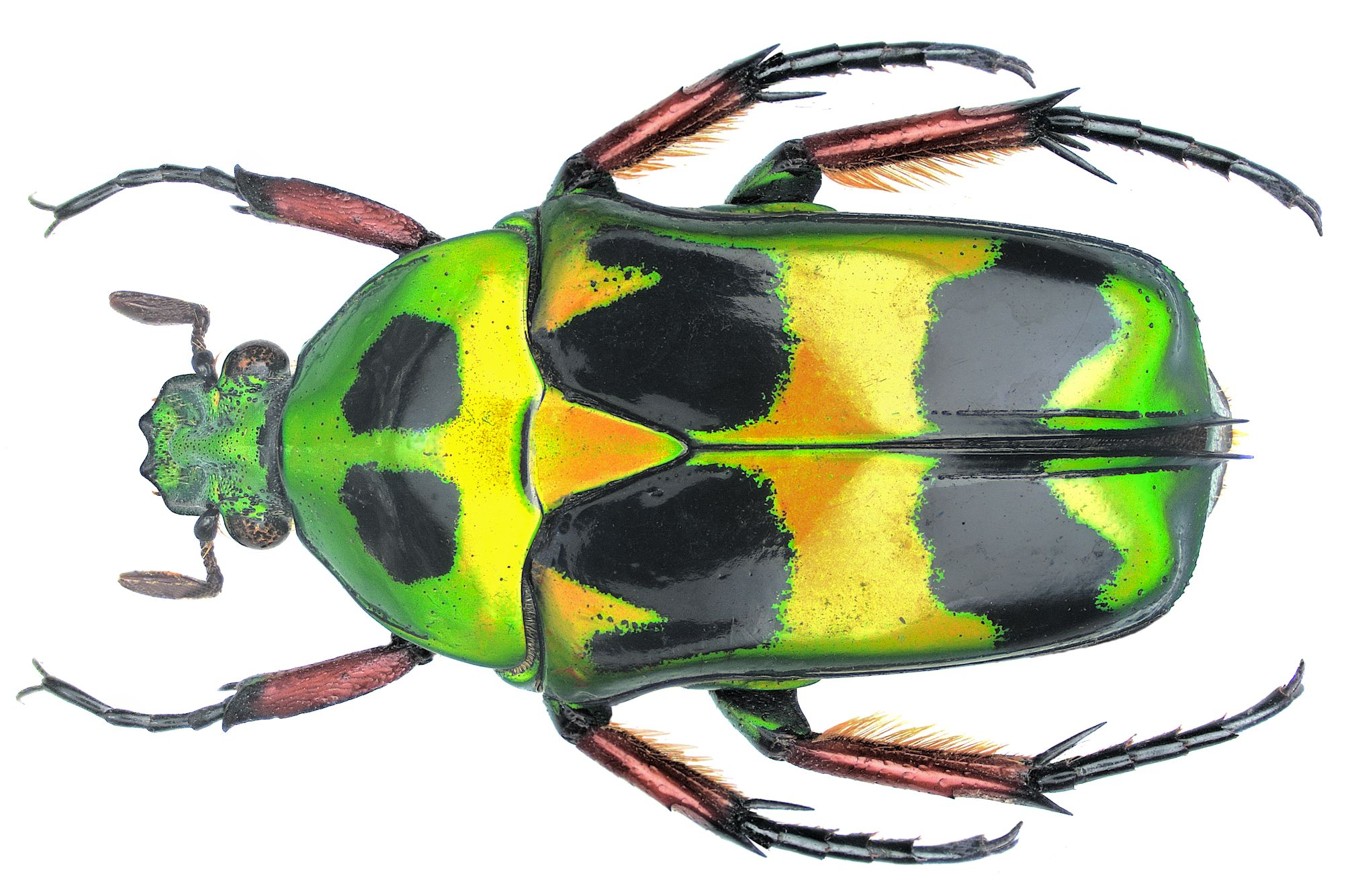 Familie: Scarabaeidae Grösse: 22 mm Fundort: Philippinen, Leyte, Catmon leg. Medicielo, 1997; det. U.Schmidt Foto: U.Schmidt, 2006